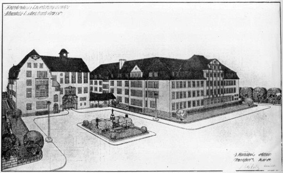 Architecturzeichnung des Carolinums Frankfurt